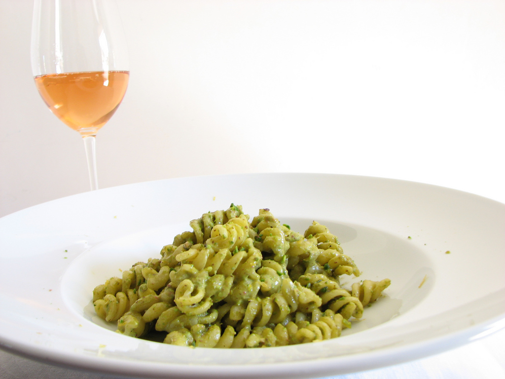 Fusilli Garofalo al pesto di pistacchio di Bronte. Sullo sfondo Franciacorta Rosé Ricci Curbastro.